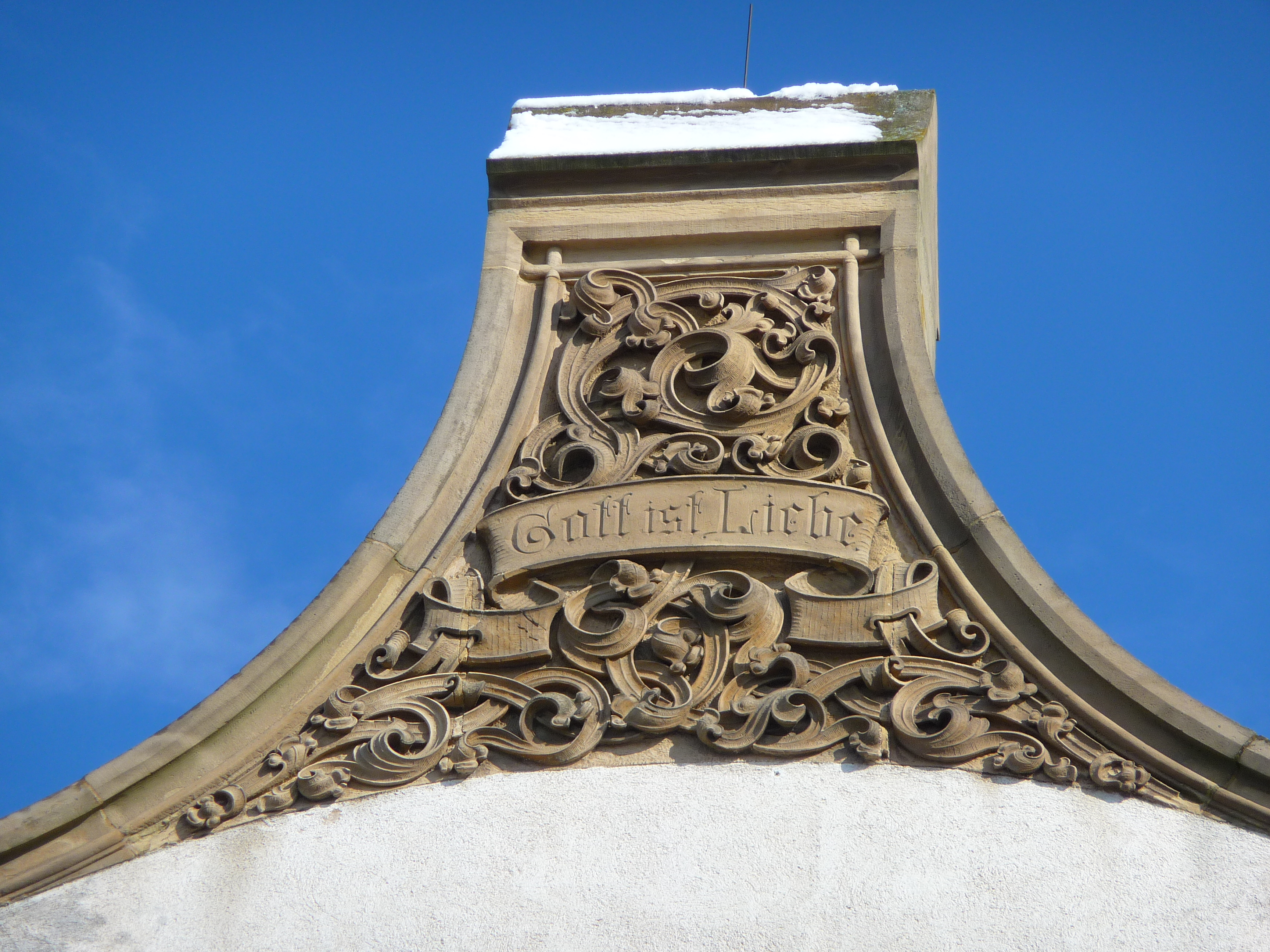 Teil der Fassade der evangelischen Friedenskirche in Heidelberg-Handschuhsheim (Deutschland)